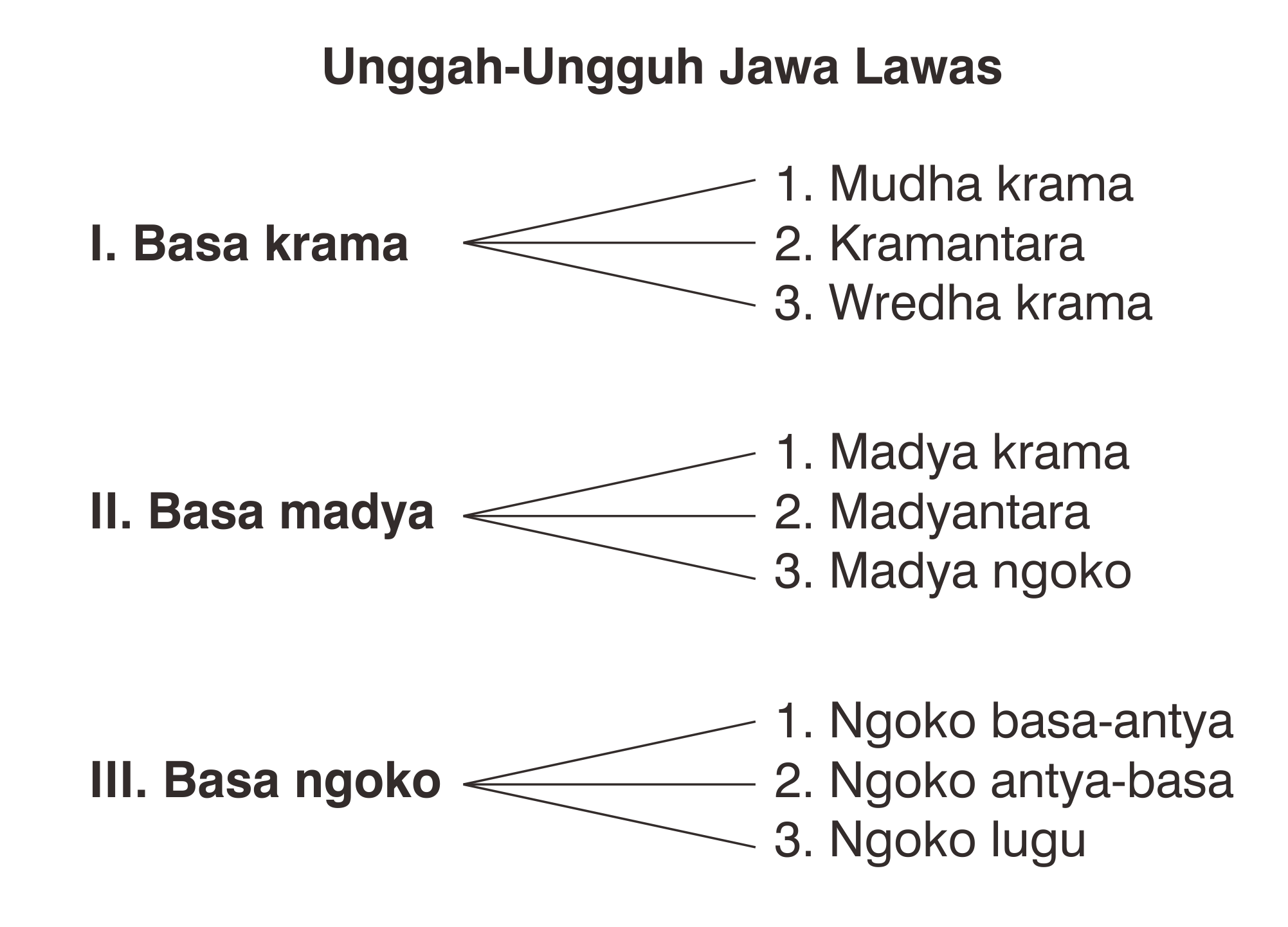 Tingkatan bahasa Jawa lama berdasarkan buku oleh Suwadji (2013). Ngoko Krama. Yogyakarta: Balai Bahasa Provinsi Daerah Istimewa Yogyakarta. ISBN 9786027777620. OCLC 890814963.